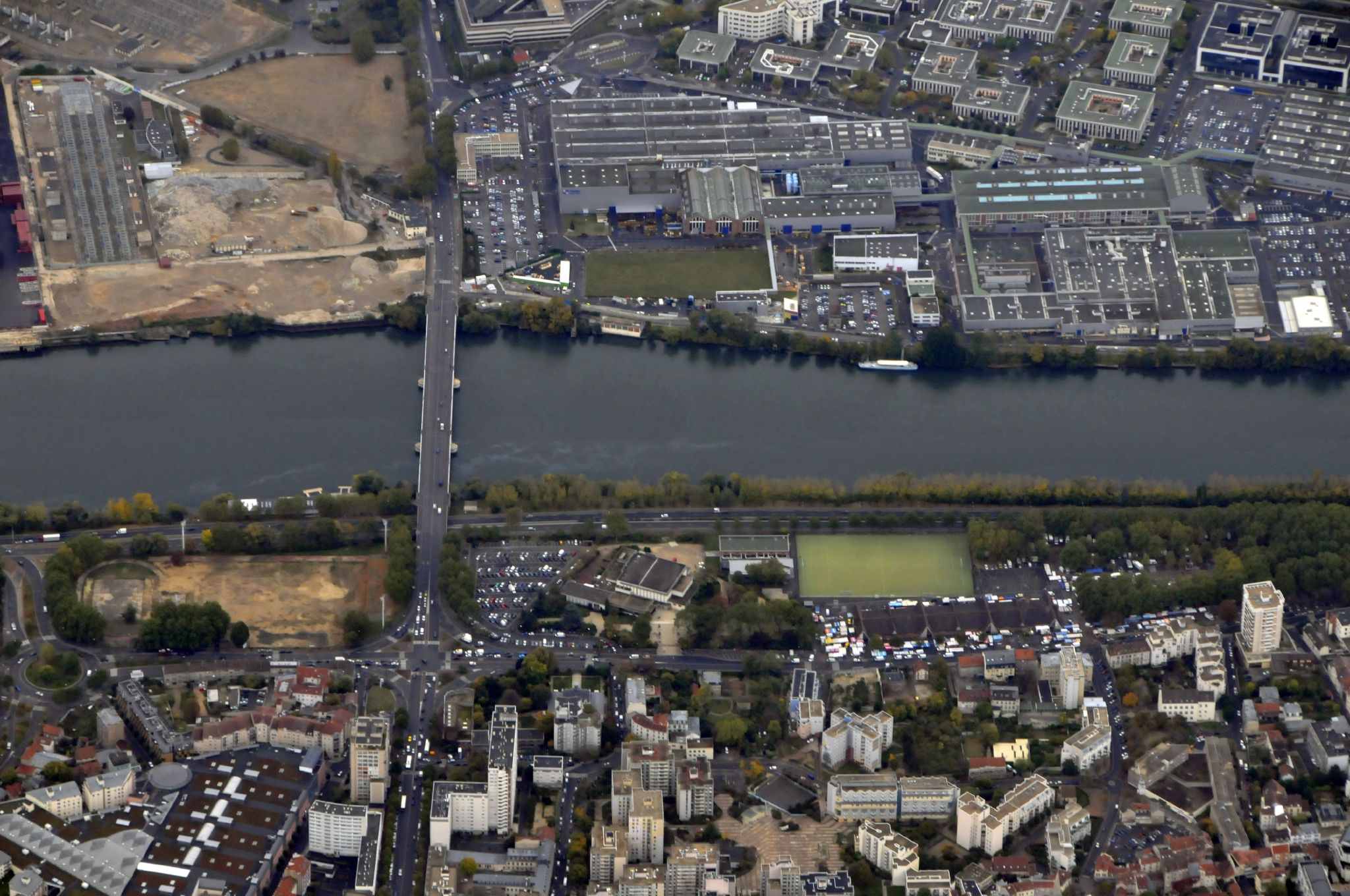 On voit ici le pont d'Argenteuil (sur la seine) dans la banlieue nord de Paris.